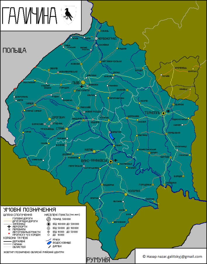 Територія сучасної Галичини.